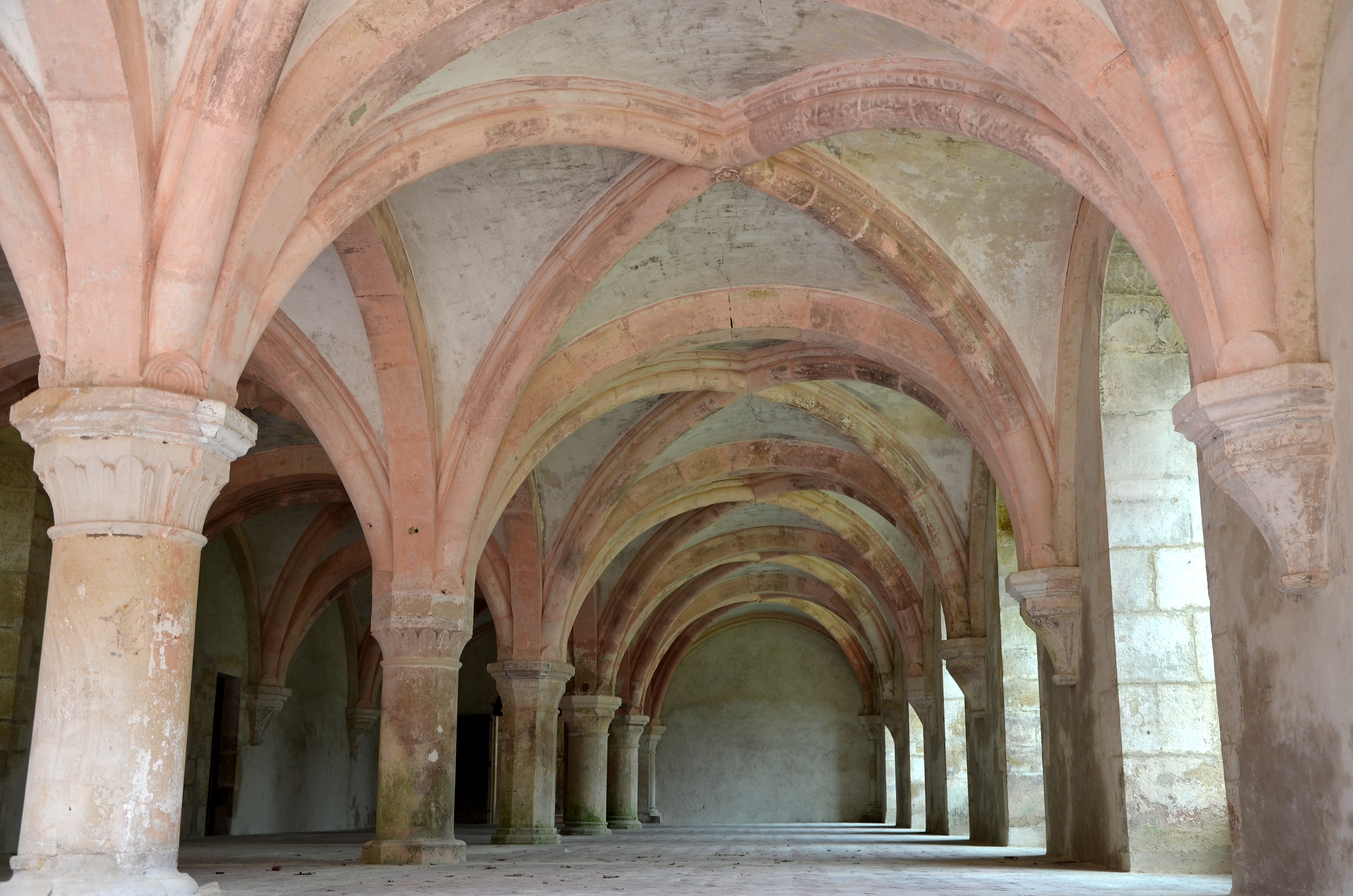 Salle des moines de l'abbaye de Fontenay, Côte d'Or, Bourgogne, France